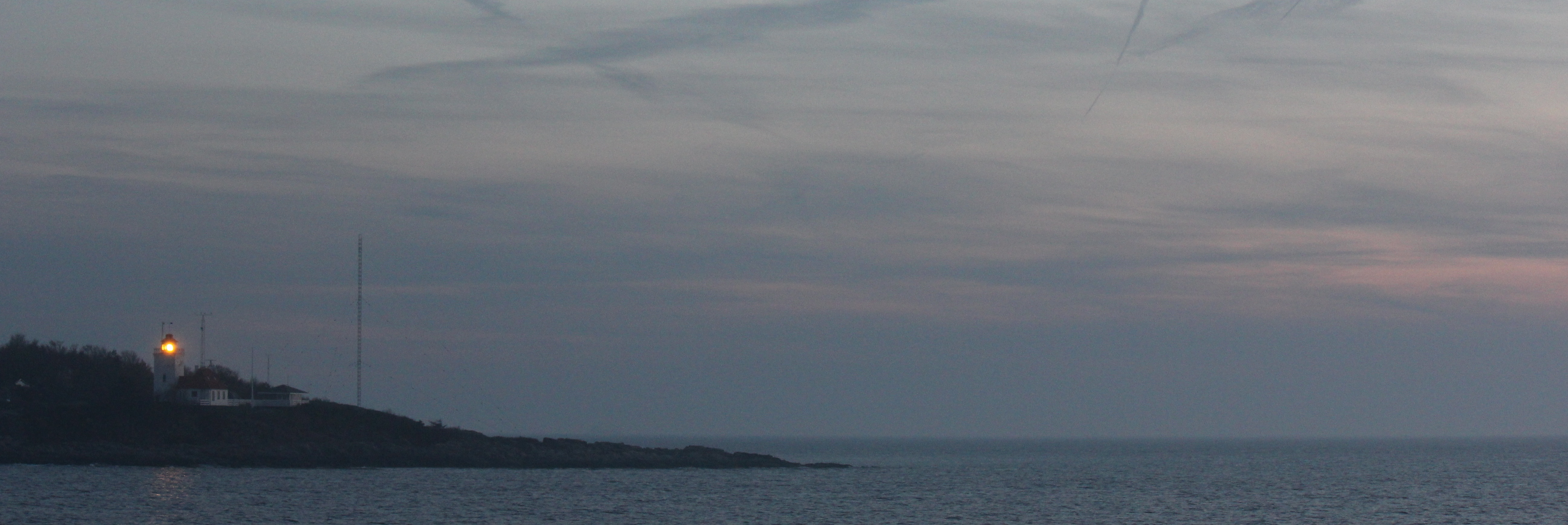 Hammer Odde Fyr på den nordlige pynt af Bornholm